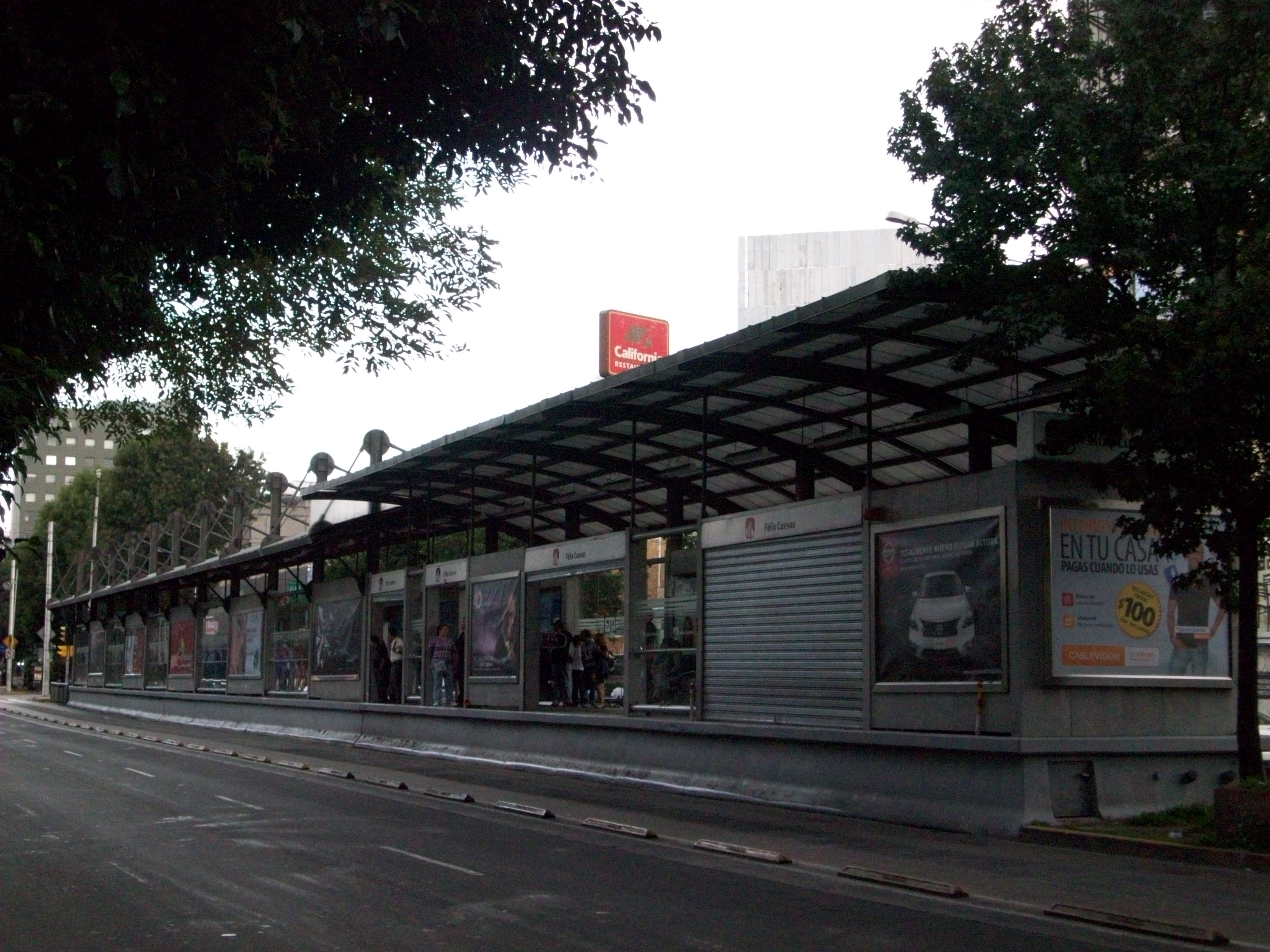 Estacion Felix Cuevas